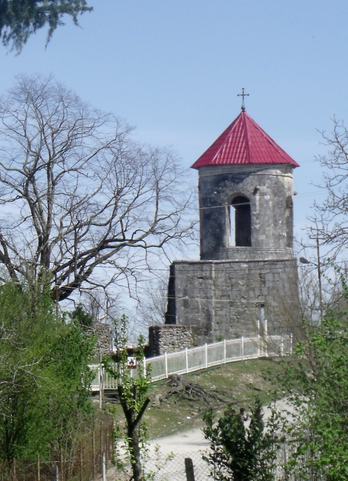 ცაიშის საკათედრო ტაძარი